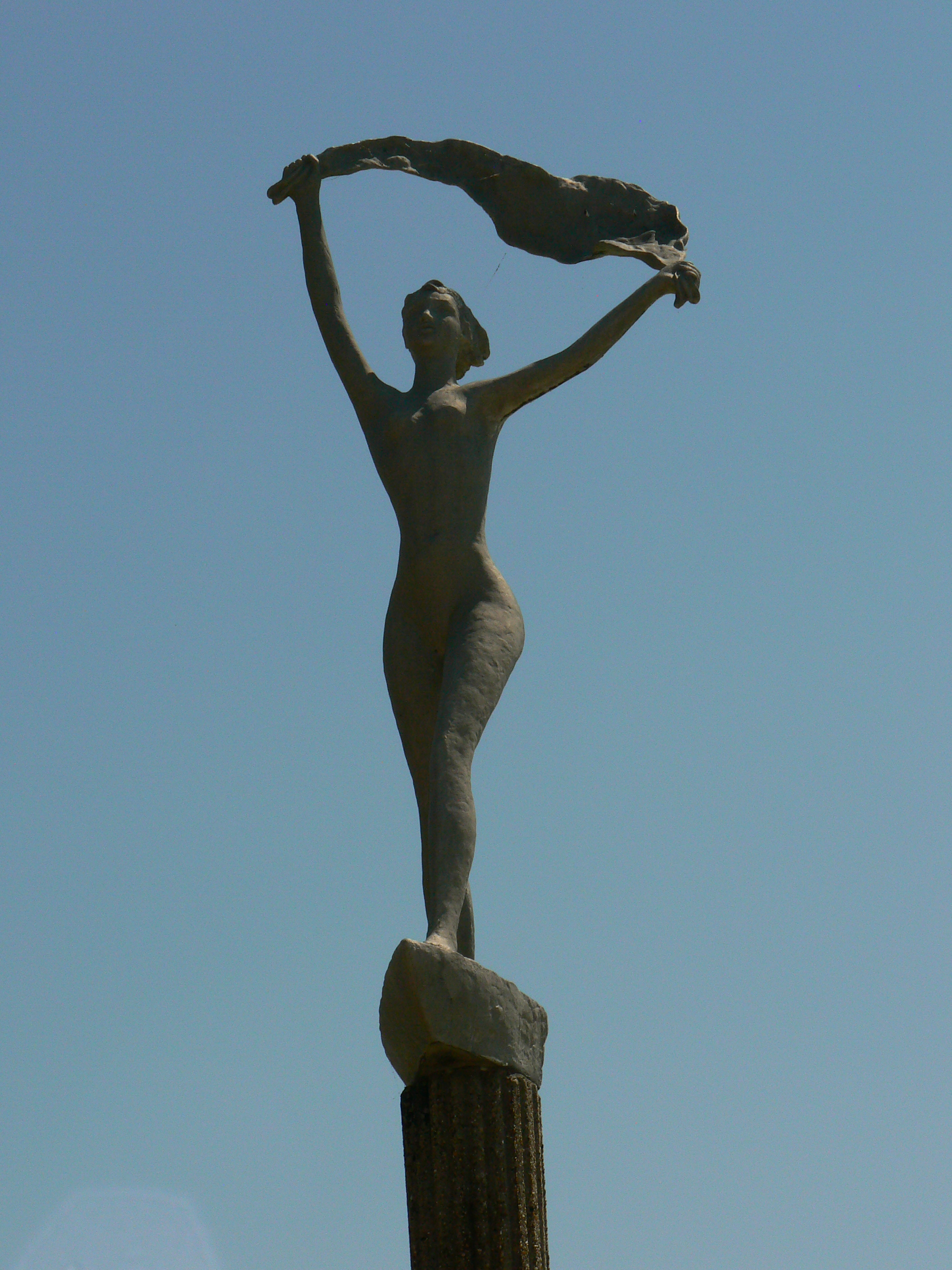 Balatonfüred, a Tagore sétány. Borsos Miklós Balatoni szél című szobra.